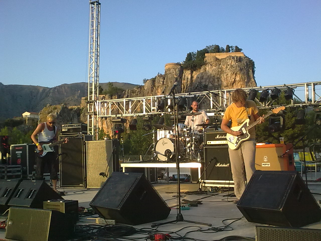 Causa Sui. II Festival de Psicodelia Castell de Guadalest - Julio de 2009